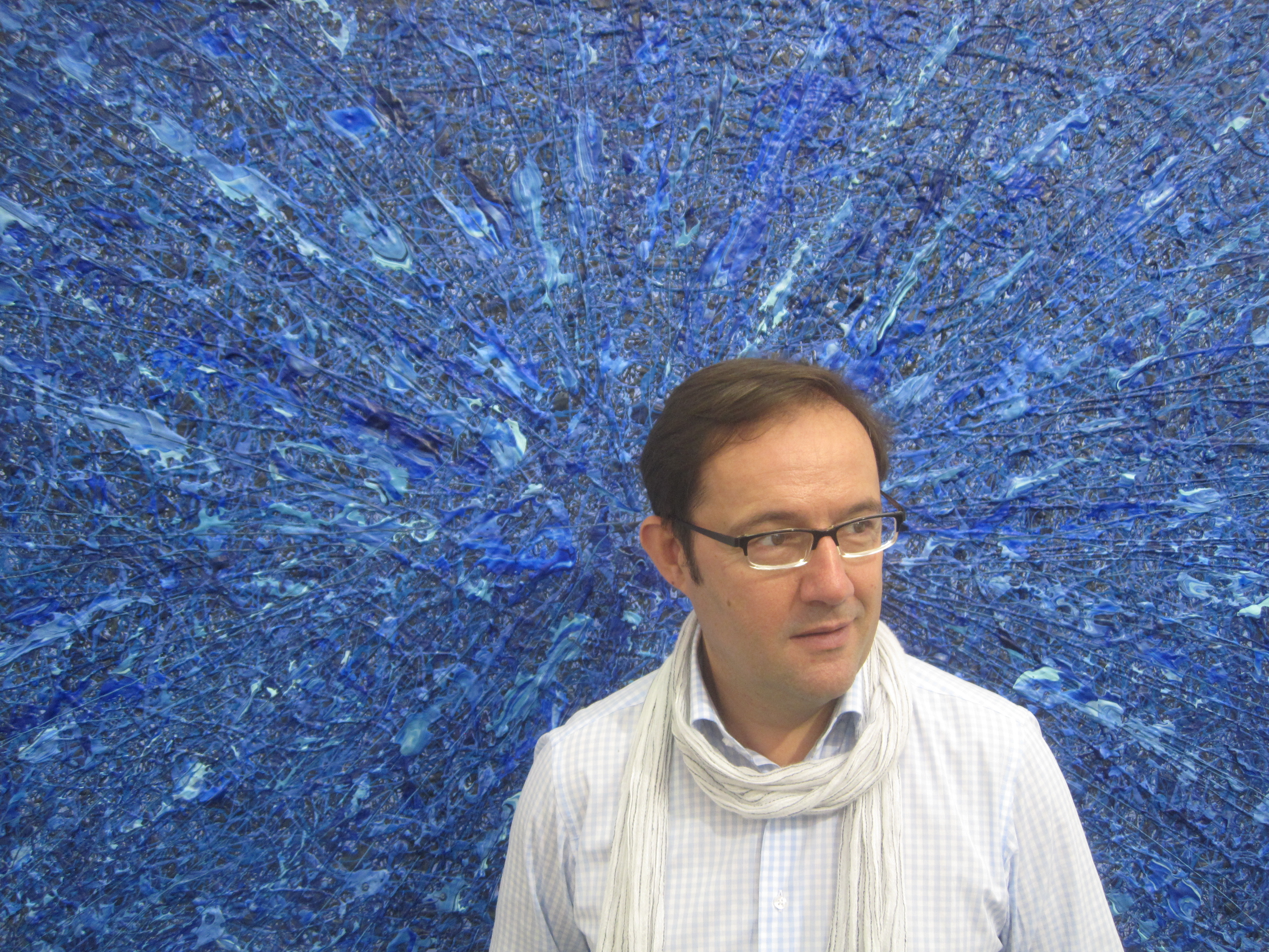 Kunst 12 Zürich